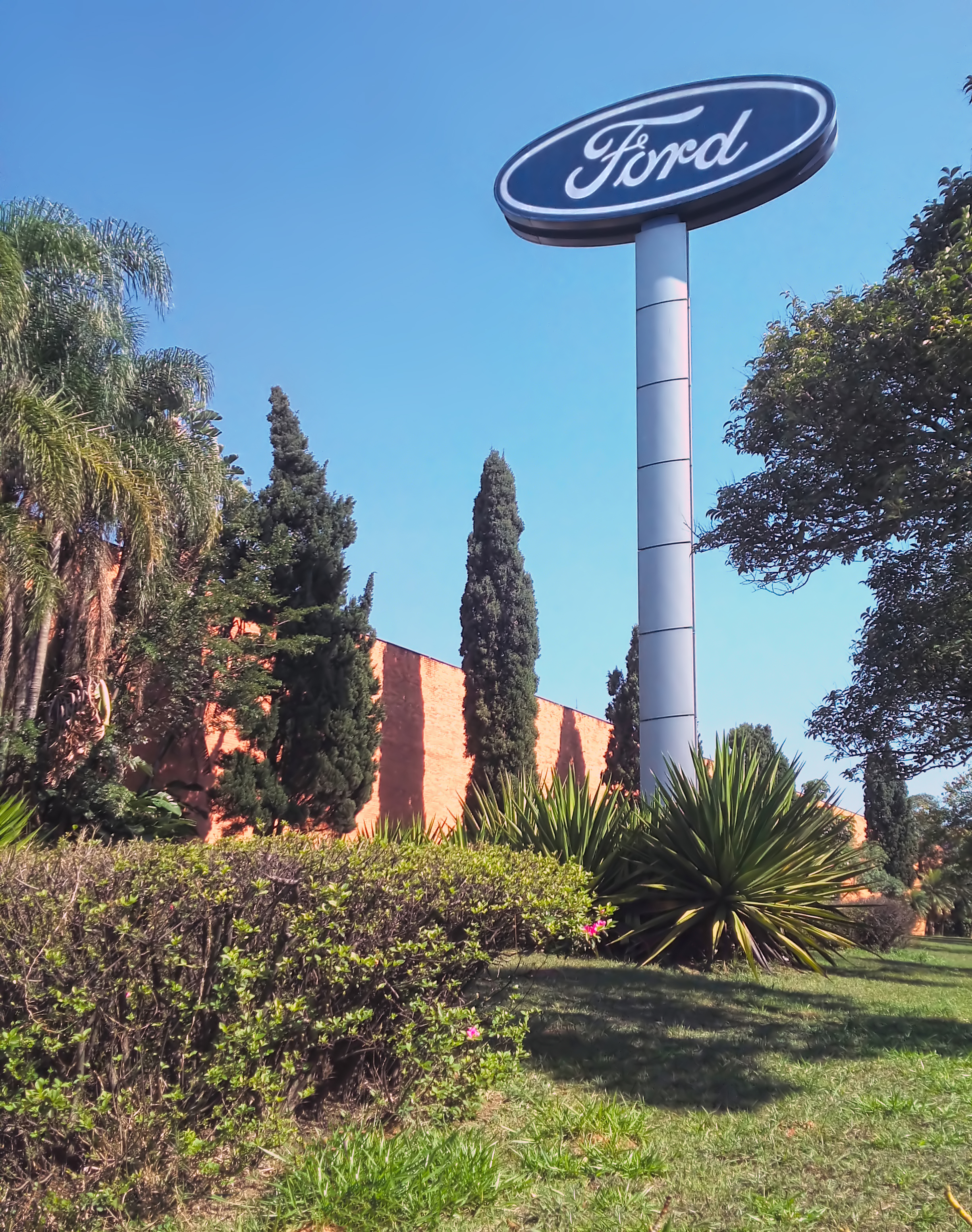 Ford Av. do Taboão, 899 - Taboão, São Bernardo do Campo - SP, 09655-000